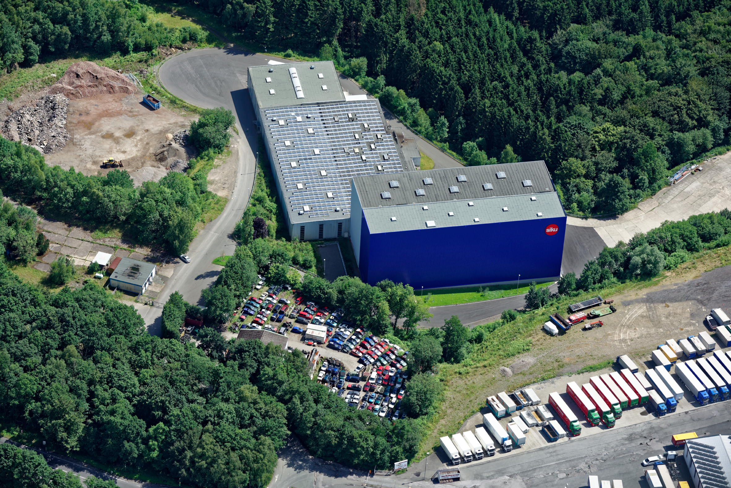 Fotoflug Sauerland West. Luftaufnahme: Werk von SIKU (Sieper GmbH) in Lüdenscheid, Nordrhein-Westfalen.